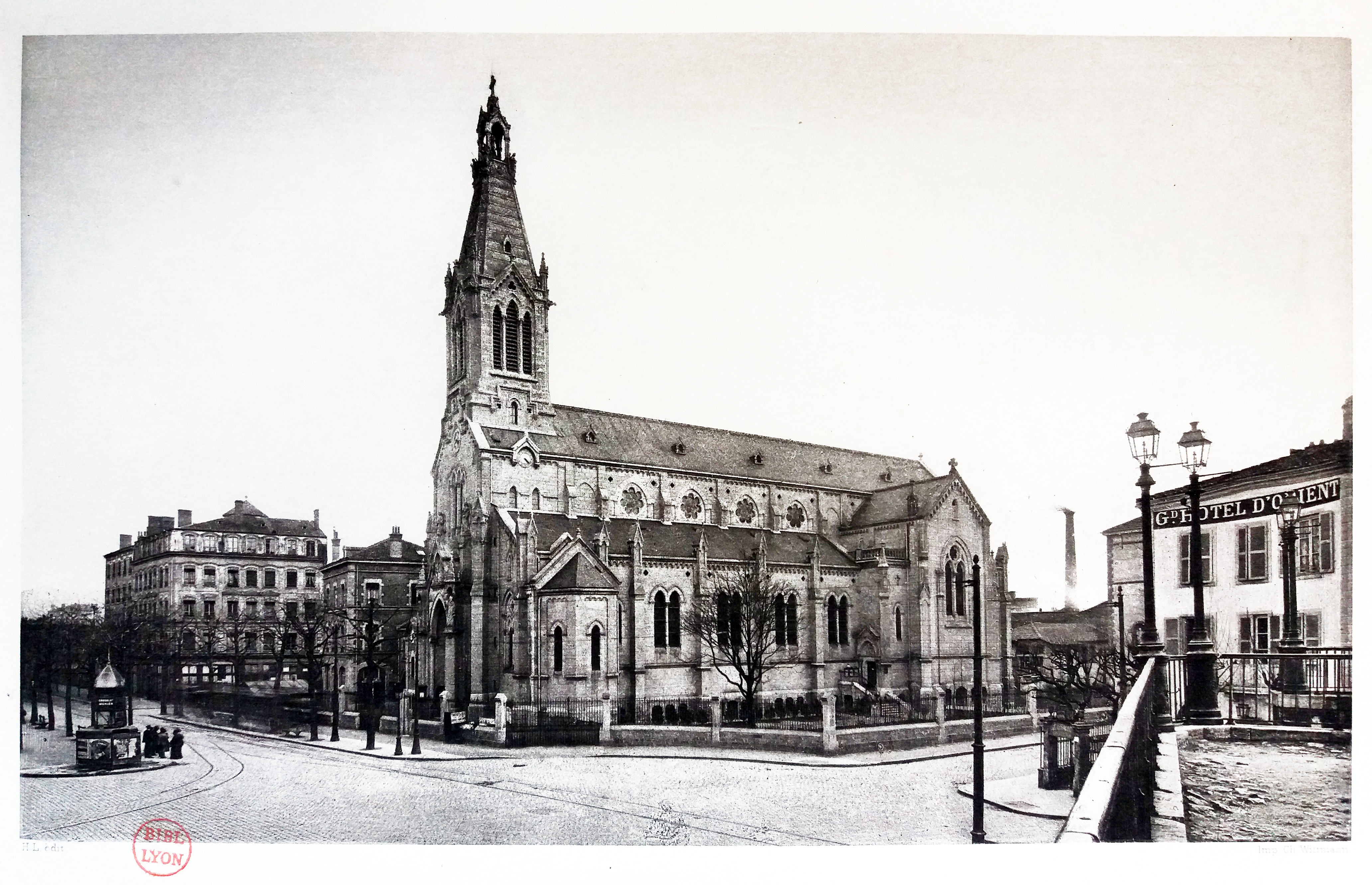 "L'Annonciation". Illustration entre les page 192 et 193 du tome I du livre de Jean-Baptiste Martin. Édité entre 1908 et 1909.